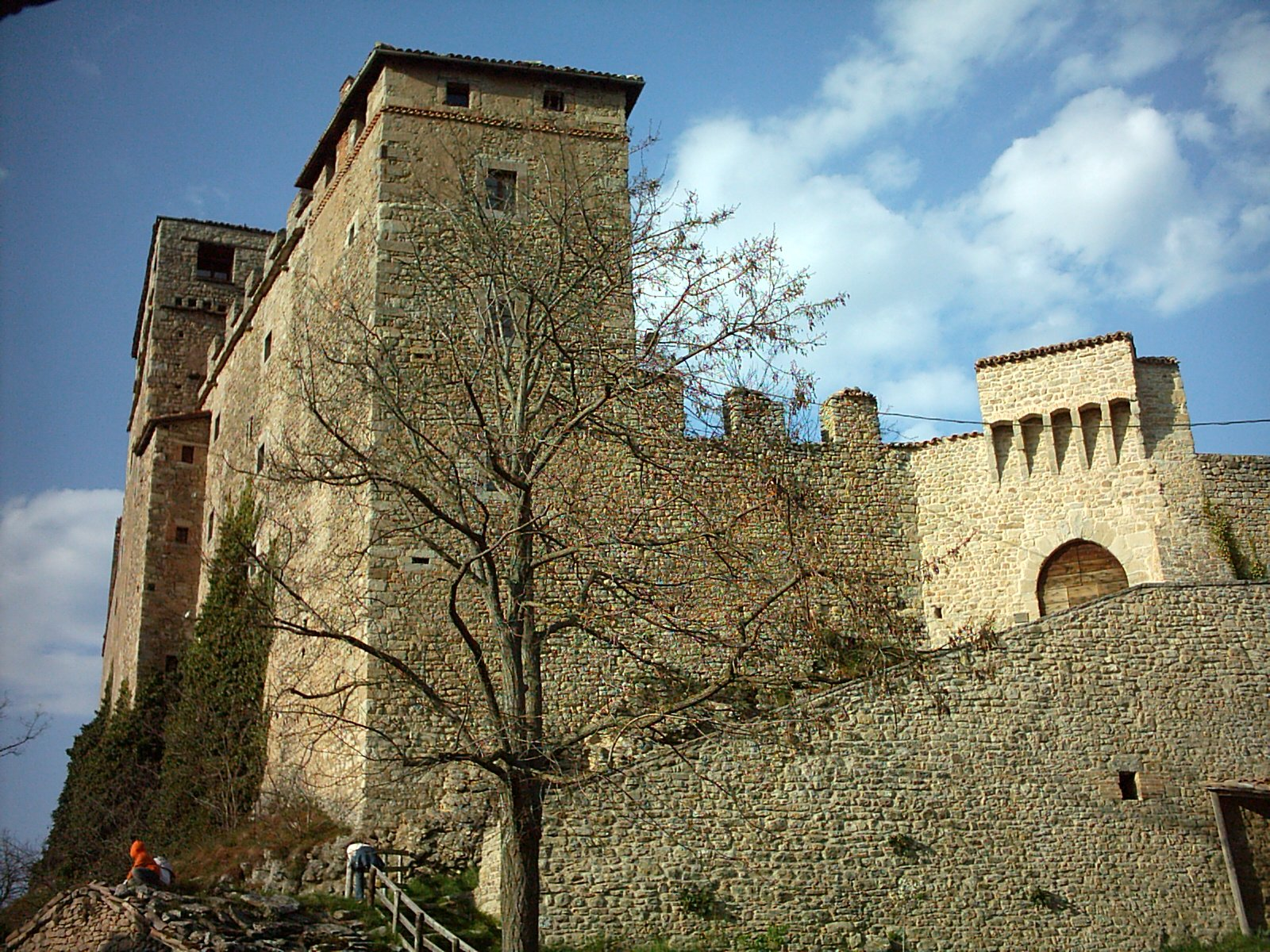 Montecuccoli's Castele - Pavullo nel Frignano, Modena, Italia